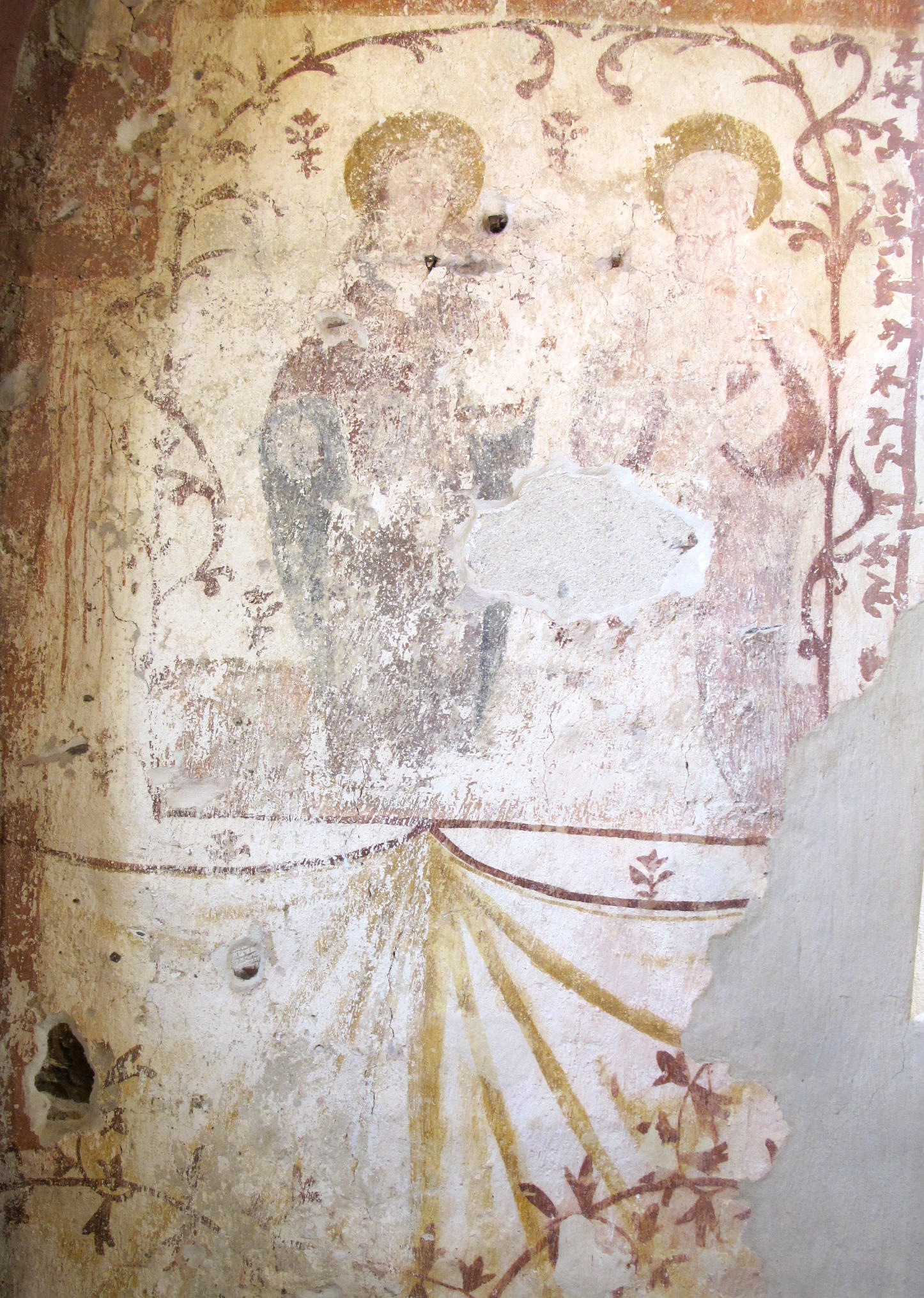 Ausschnitt Fresko aus der Kulturkapelle Krewinkel, Gemeinde Büllingen in Belgien